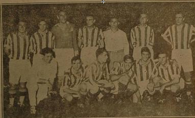 Equipo de Unión de Santa Fe que en el año 1932 realizo una temporada nocturna